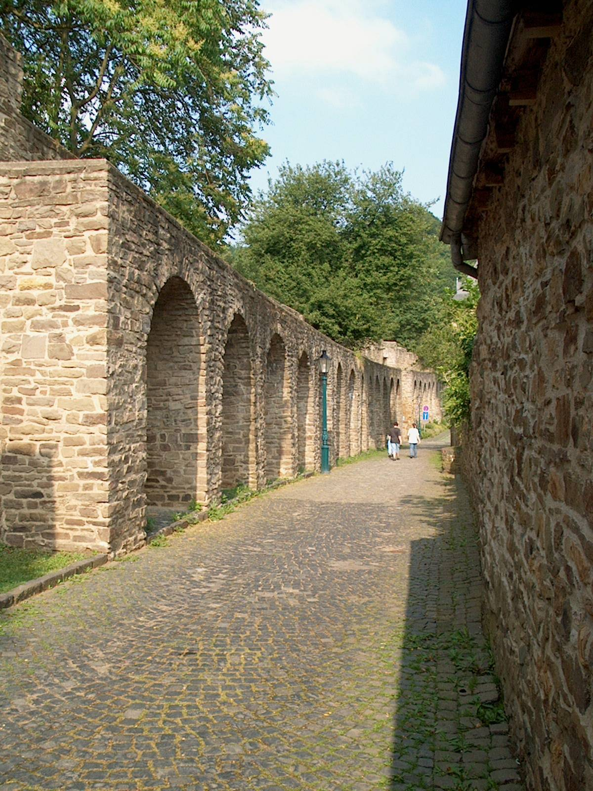 Bad Münstereifel - mittelalterliche Stadtmauer